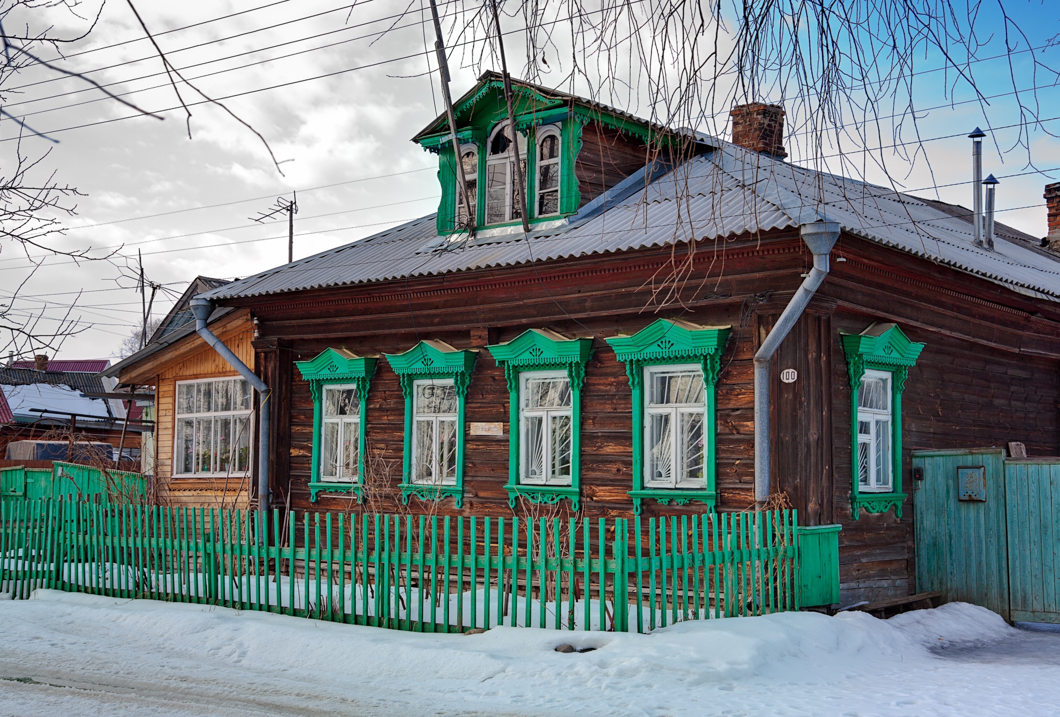 Переславль, Правая Набережная, дом 100